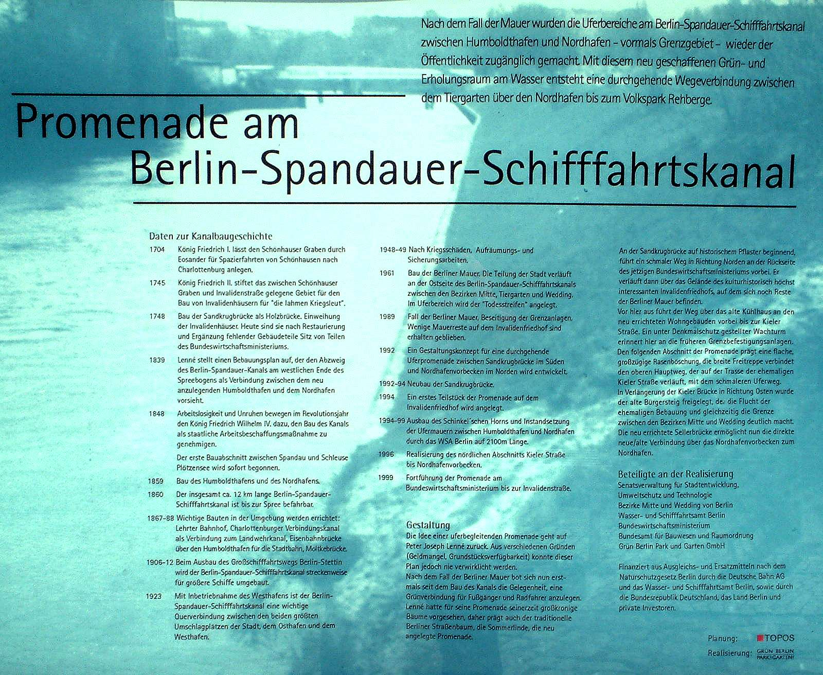 Tafel an der Promenade am Berlin-Spandauer-Schifffahrtskanal